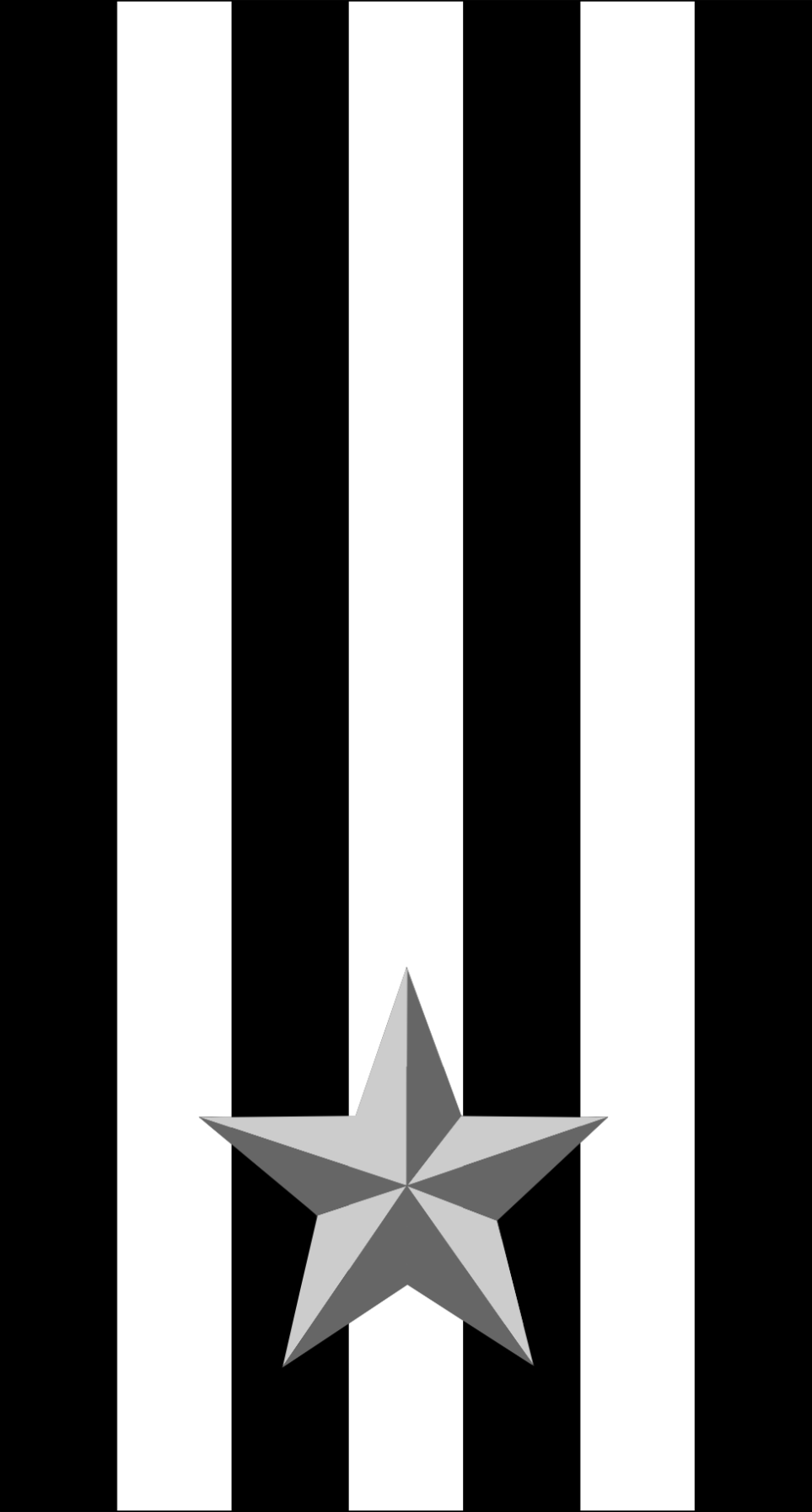 Mostrina della 101ª Divisione motorizzata "Trieste"